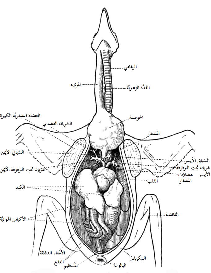 تشريحٌ لِحمامة يُظهرُ أعضاء الطائر الداخليَّة.